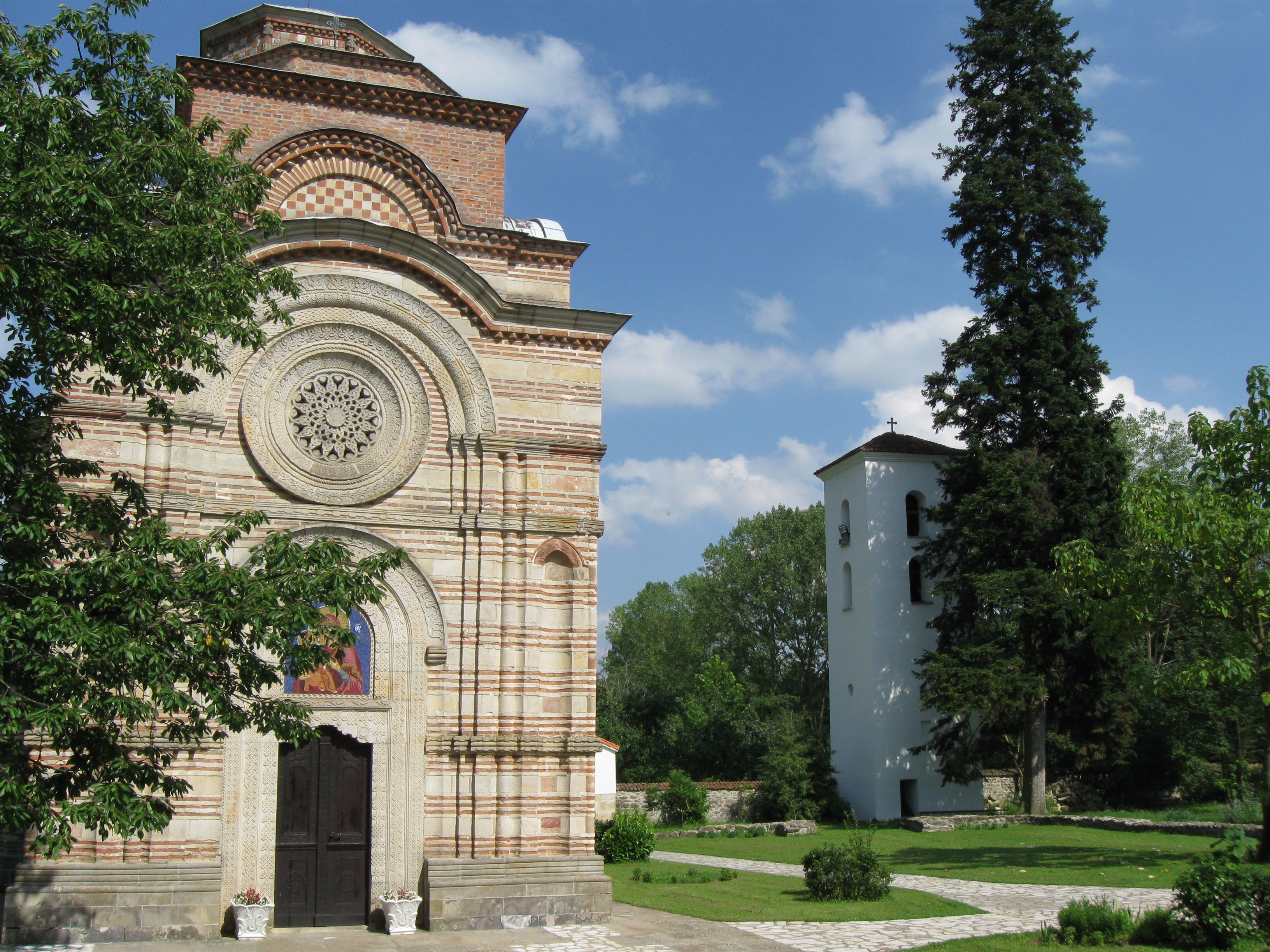 Каленић – Црква са звоником.